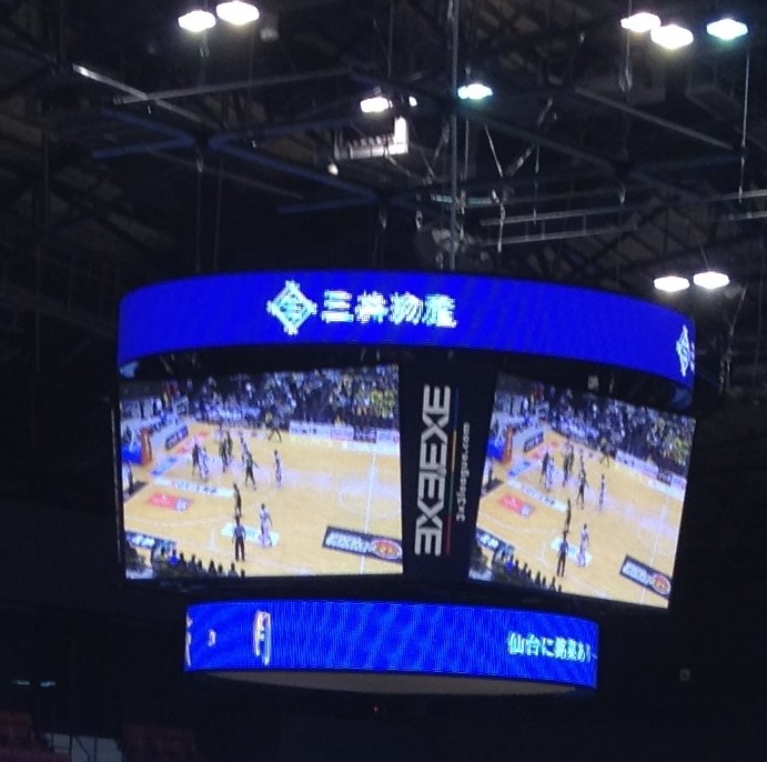 bjリーグ 東地区 リーグ戦・仙台89ERS vs 横浜ビー・コルセアーズ ゼビオアリーナ仙台（2015年3月）